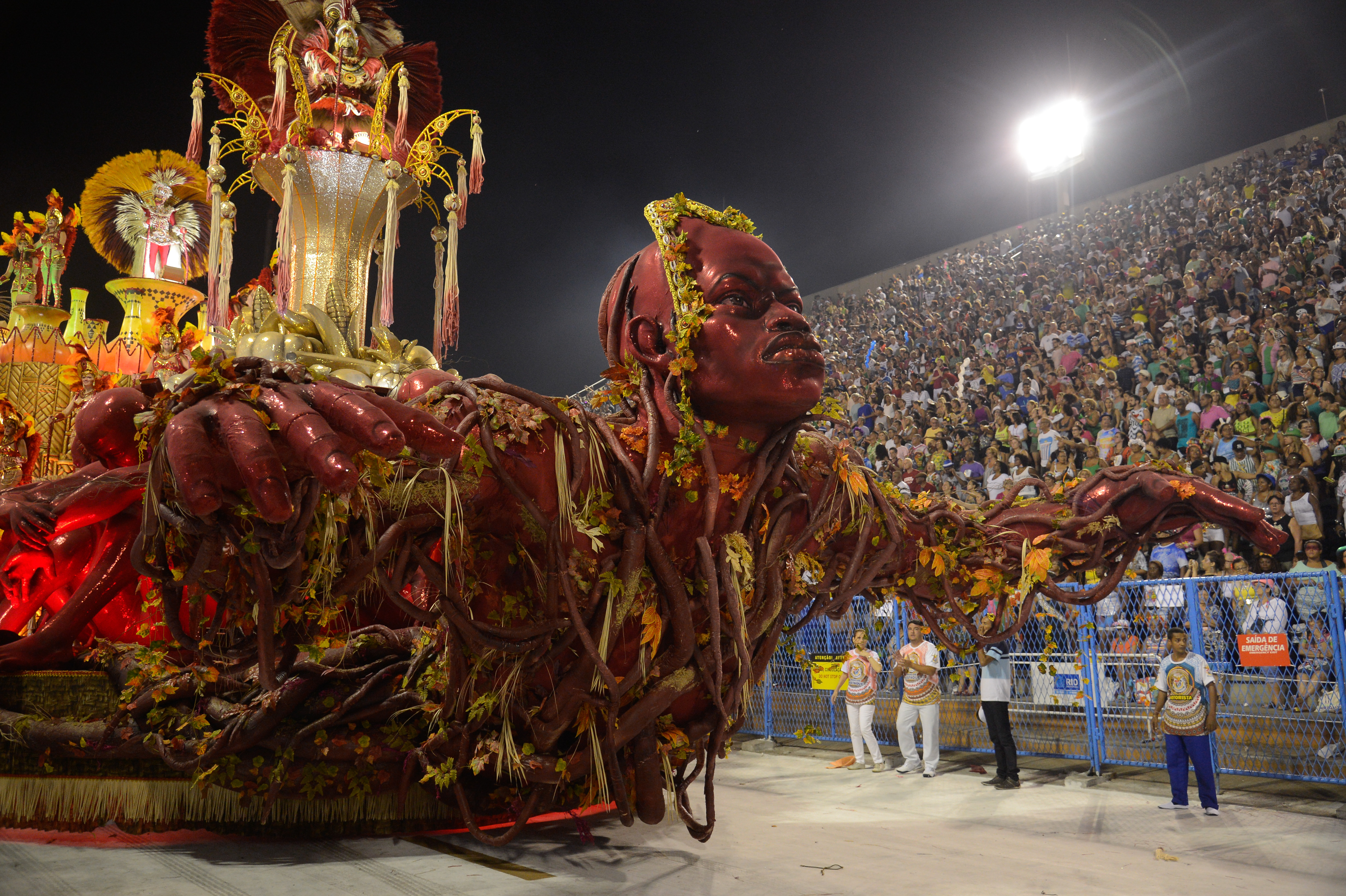 Rio de Janeiro - Desfile da escola de samba União da Ilha do Governador, pelo grupo especial, no Sambódromo (Fernando Frazão/Agência Brasil)